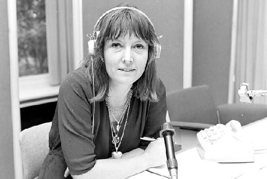 Germaine Groenier